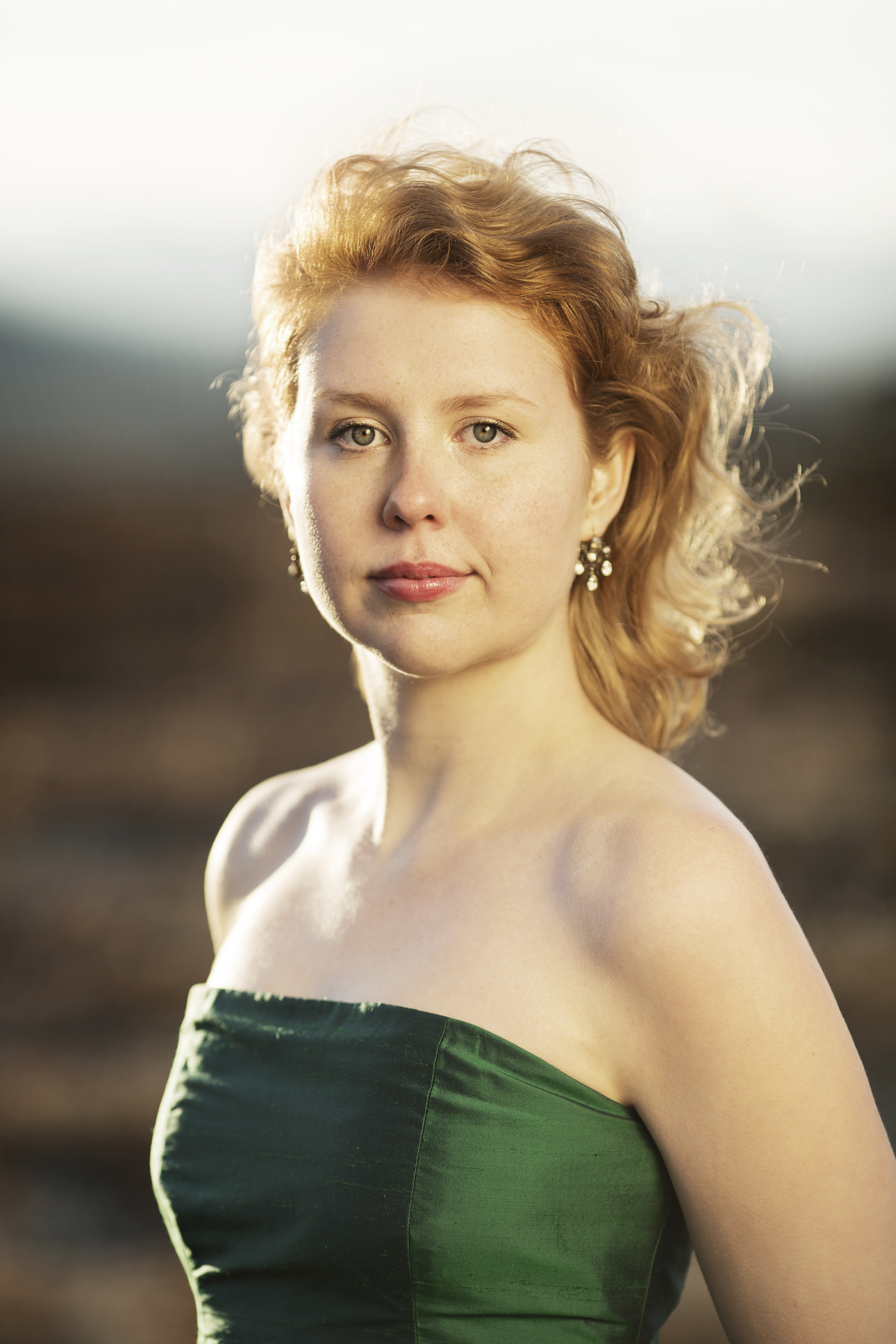 Violasten Ellen Nisbeth.